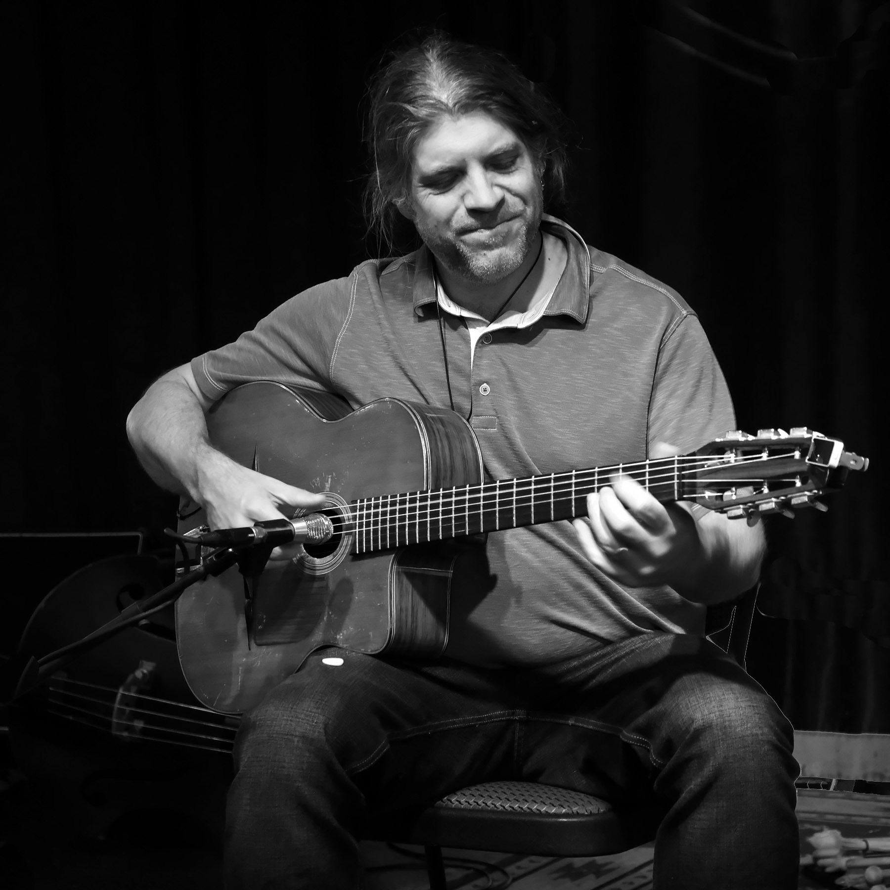 Stéphane Wrembel en concert (Loving Cup, Rochester NY - nov. 2017).